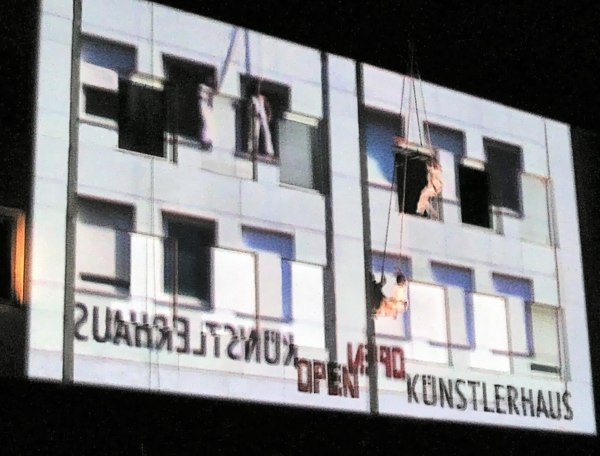 Vertikaltanz-Performance „Danse des Cariatides“ der französischen Compagnie Retouramont beim internationalen Straßenzirkusfestival LA STRADA 2012 in Bremen; als Platzinszenierung auf dem neben dem Bremer Hauptbahnhof gelegenen Gelände des ehemaligen Güterbahnhofs an und vor der Fassade des dortigen Künstlerhauses Güterabfertigung.